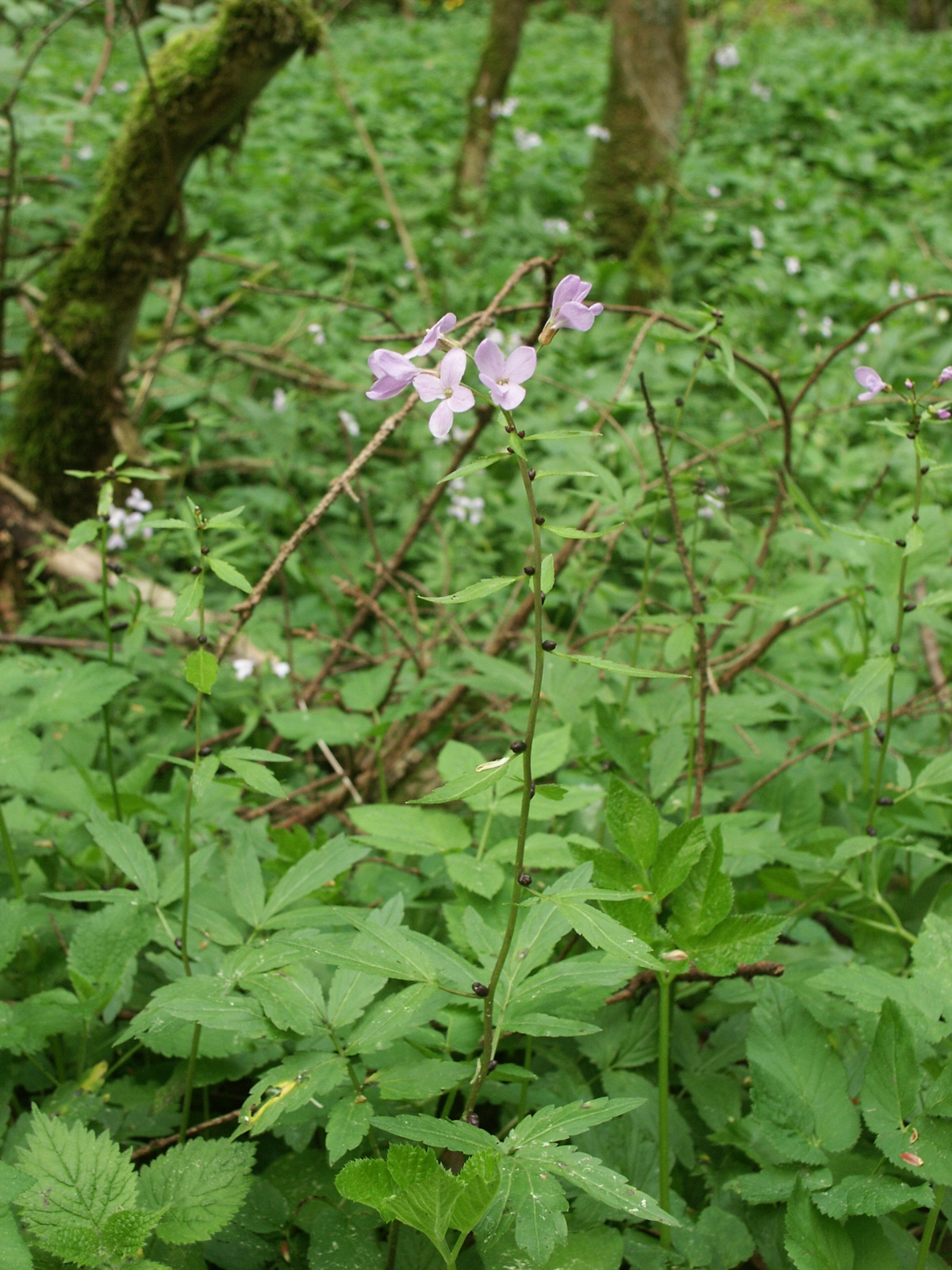 Cardamine bulbifera, Hohenloher Land, Baden-Württemberg, Germany